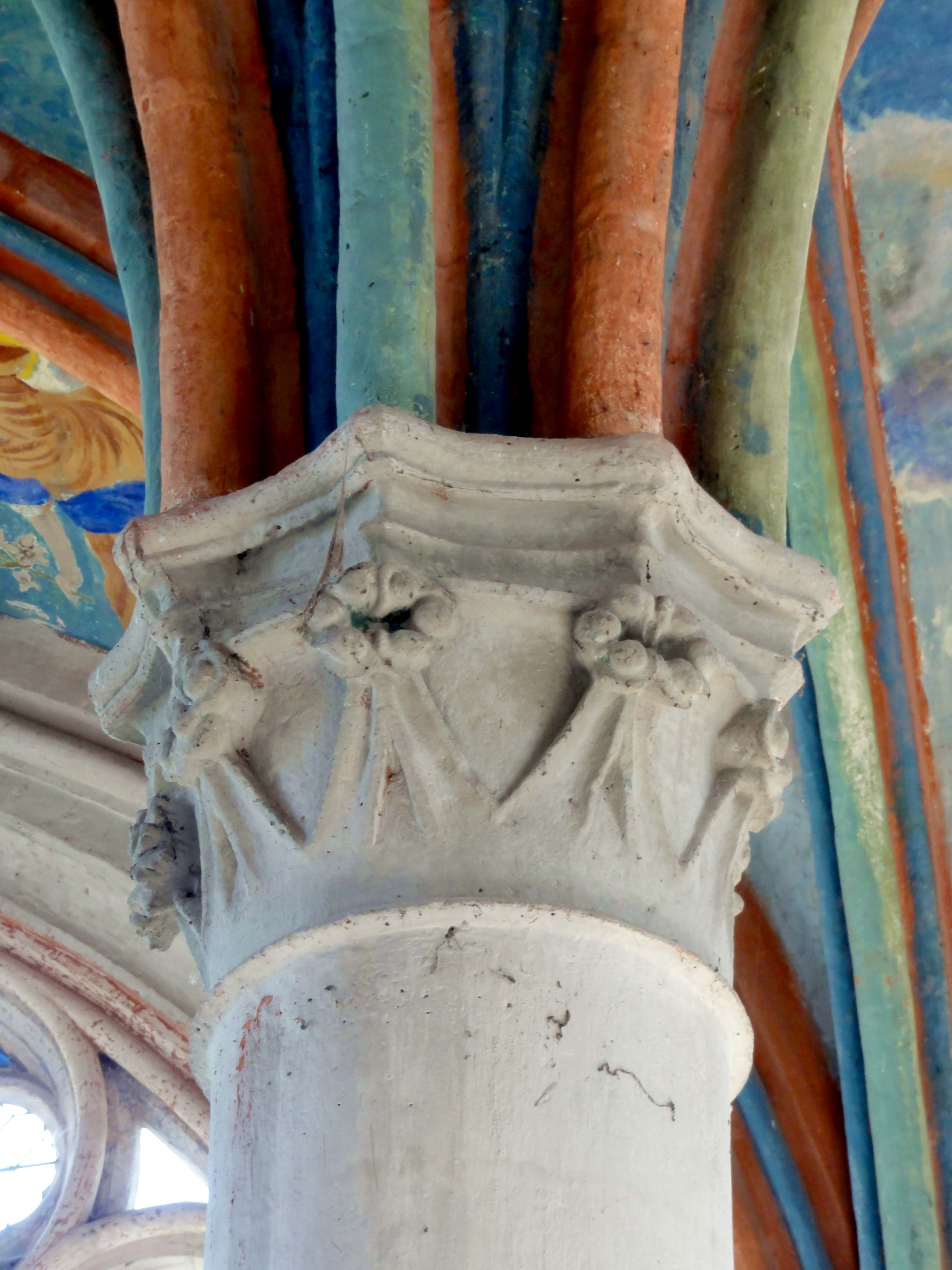 Chapiteau(x) - voir titre.